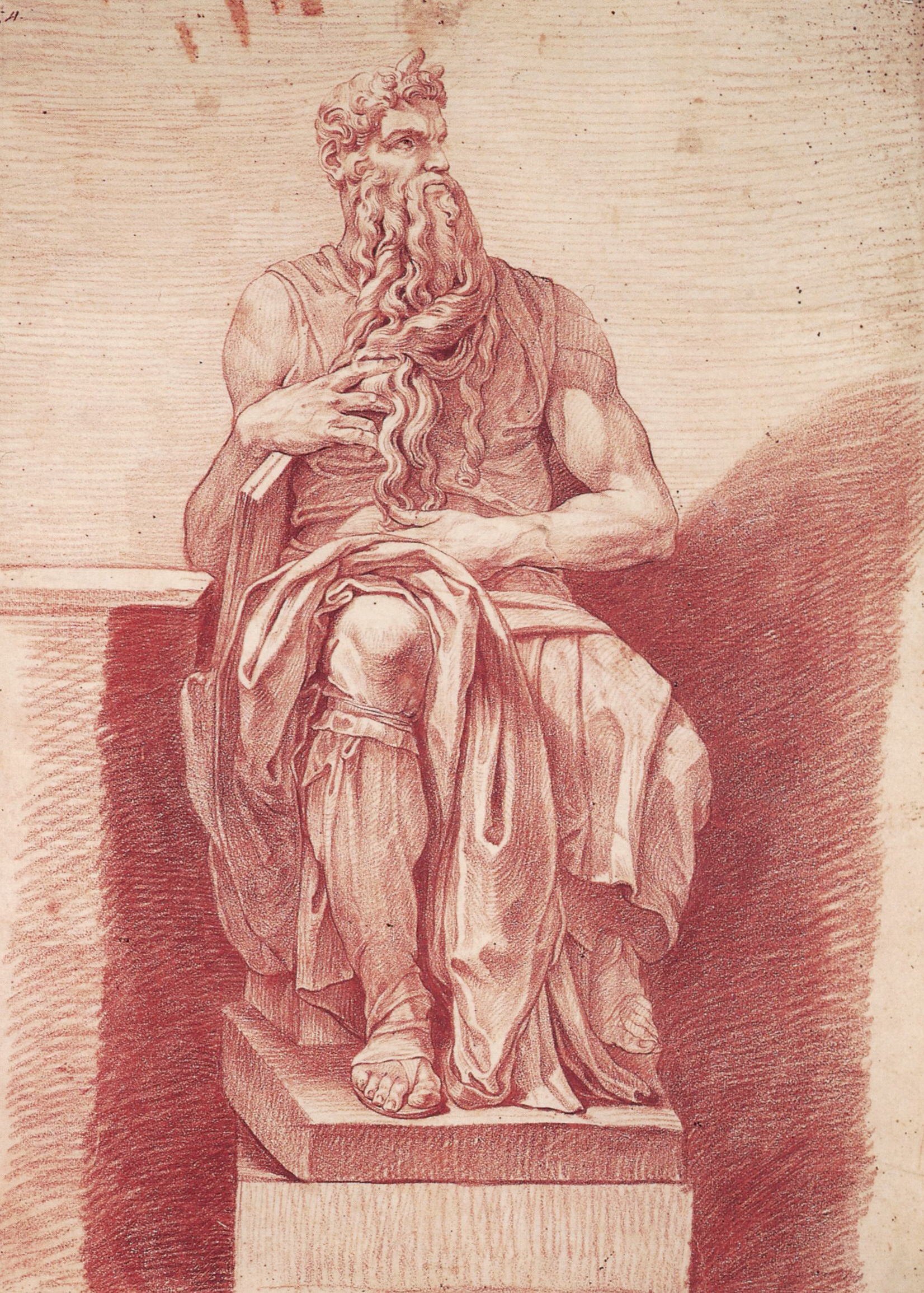 Peter Anton von Verschaffelt: Statue des Moses von Michelangelo, after 1737 Drawing, 58 x 43 cm Gallery: Reiss-Engelhorn-Museen, Mannheim